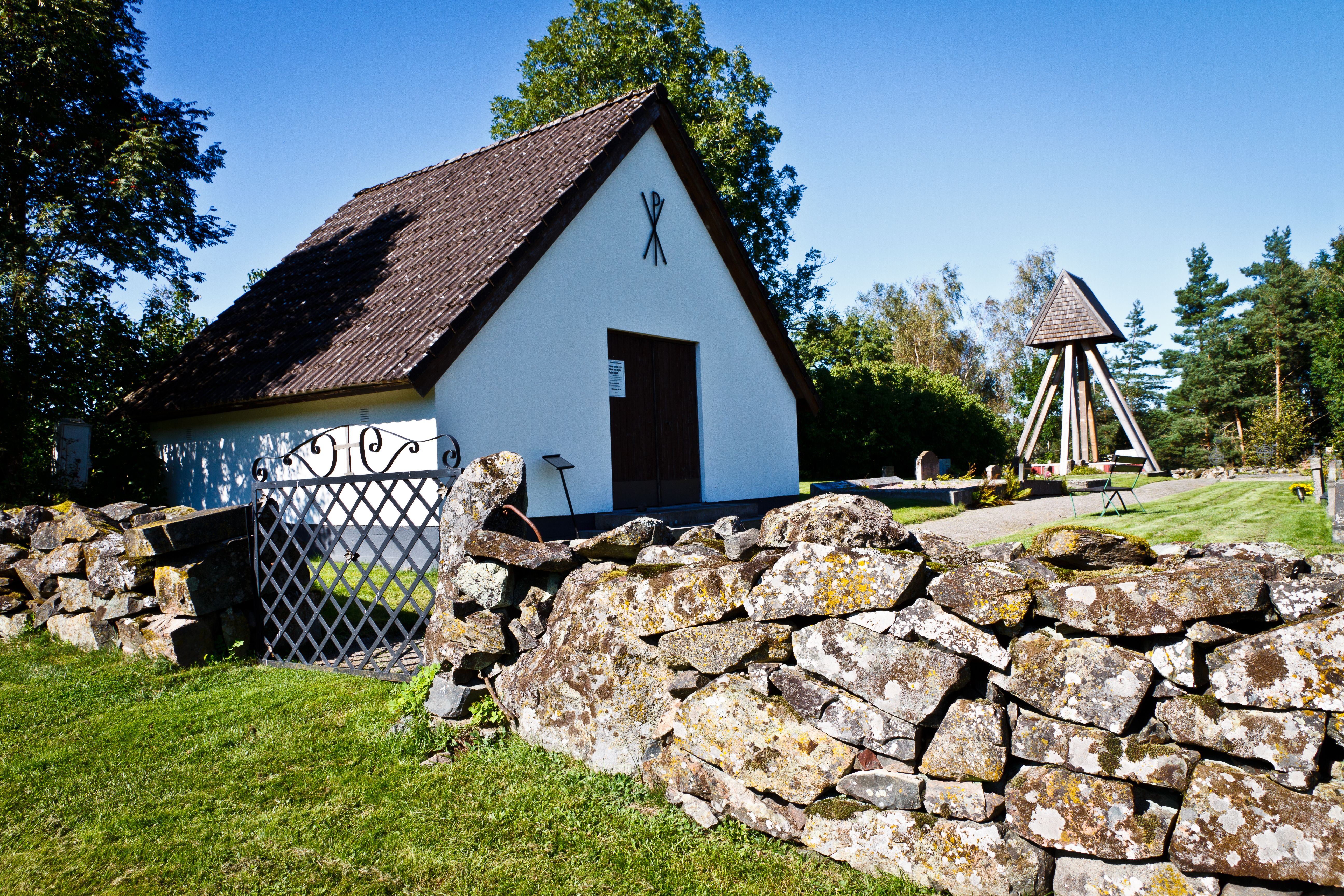 Tydje kapell (Tydje stom 2:1), Åmål